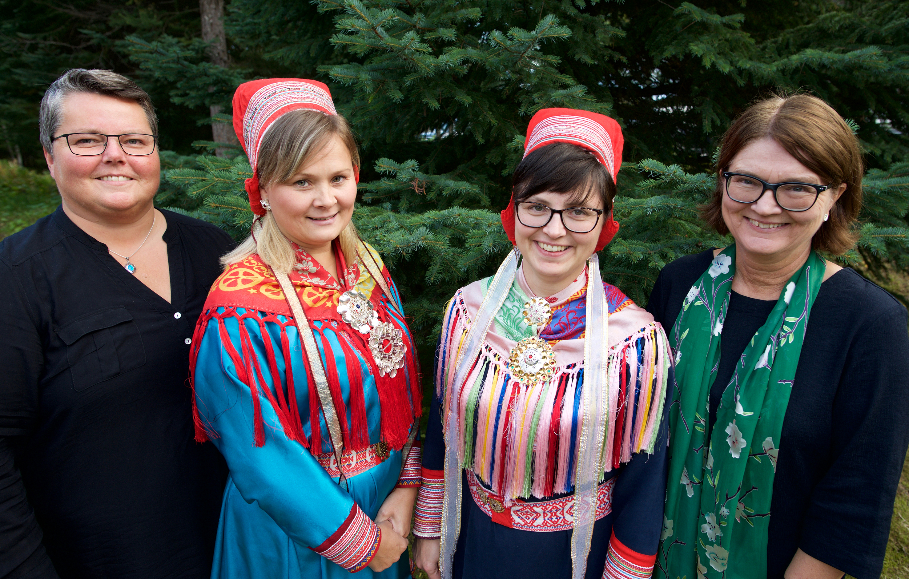 Fra venstre: Kristine Sandmæl, Sara Ellen Anne Eira, Risten Turi Aleksandersen og Berit Hagen Agøy.